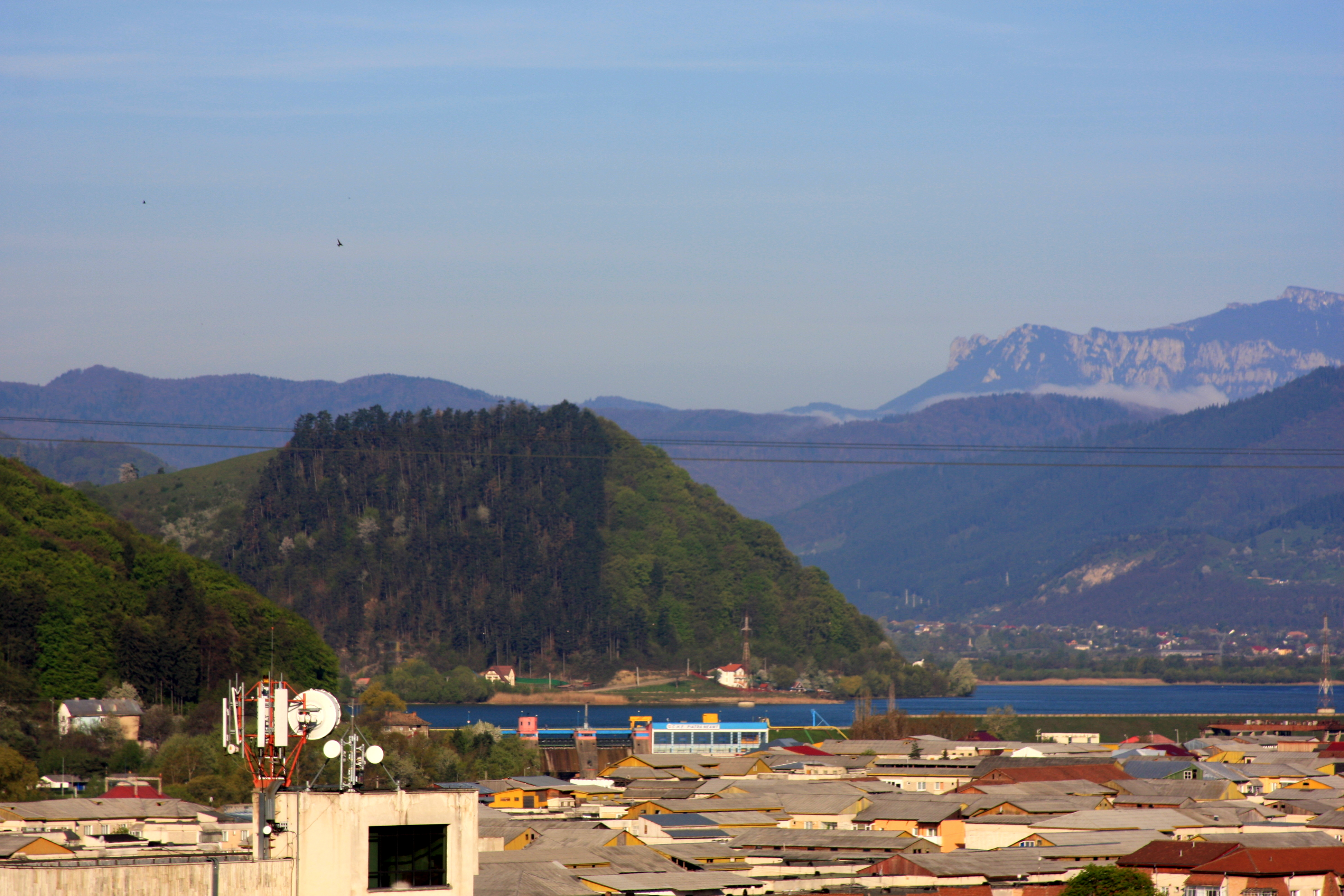 Batca Doamnei Piatraneamt